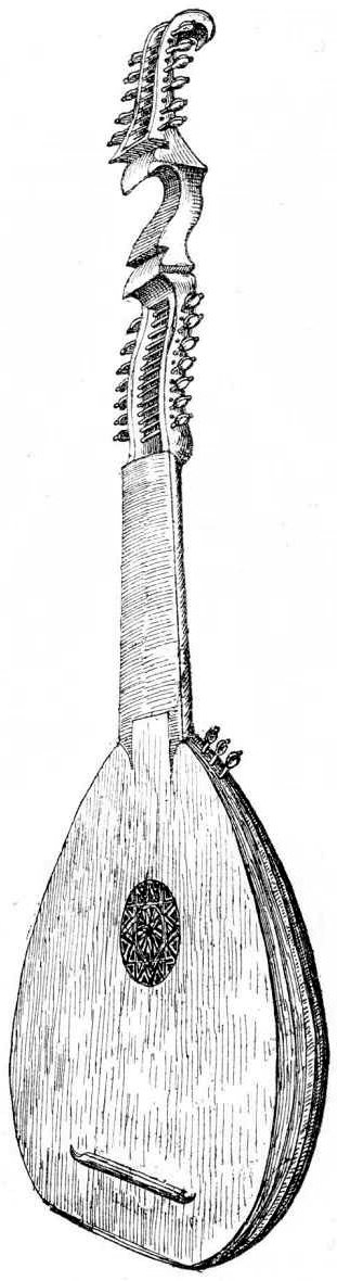 Teorban pospolity w możniejszych domach szlacheckich z XVIII wieku